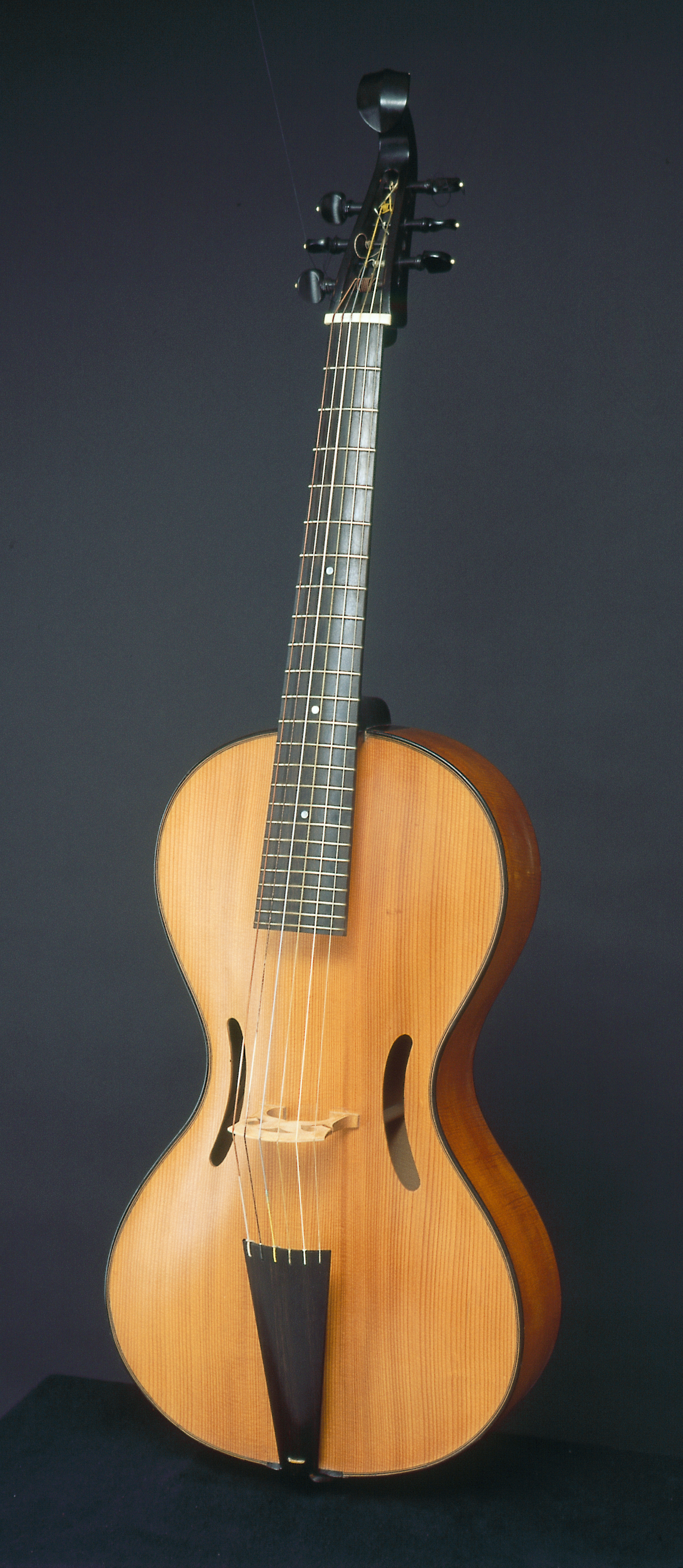 Henning Aschauer, Geigenbauer aus Düsseldorf, baute dieses Arpeggione 1968 nach Angaben von Alfred Lessings.